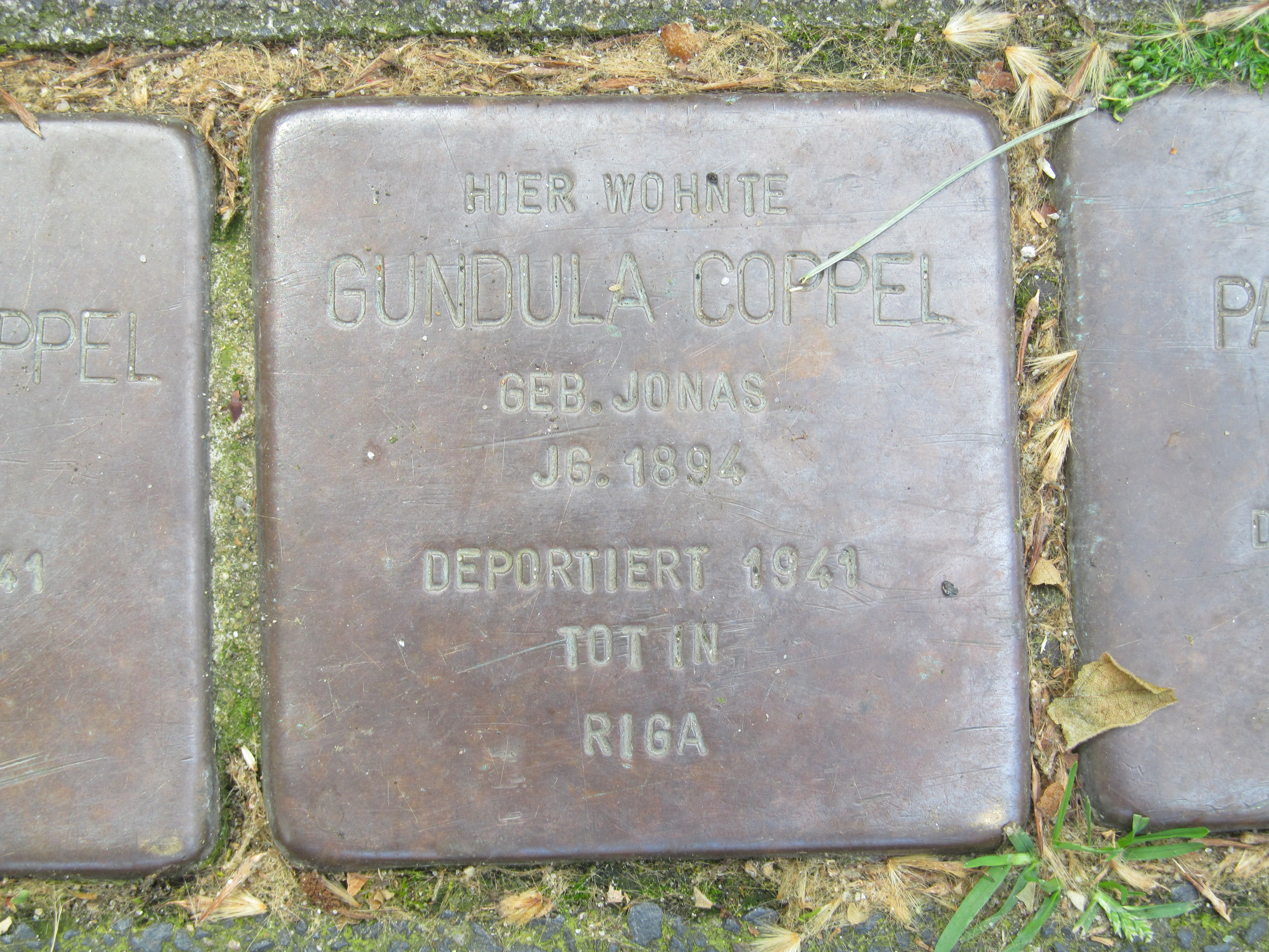 der Stolperstein für Gundula Coppel vor dem Haus Rheinstraße 27 in Duisburg-Homberg